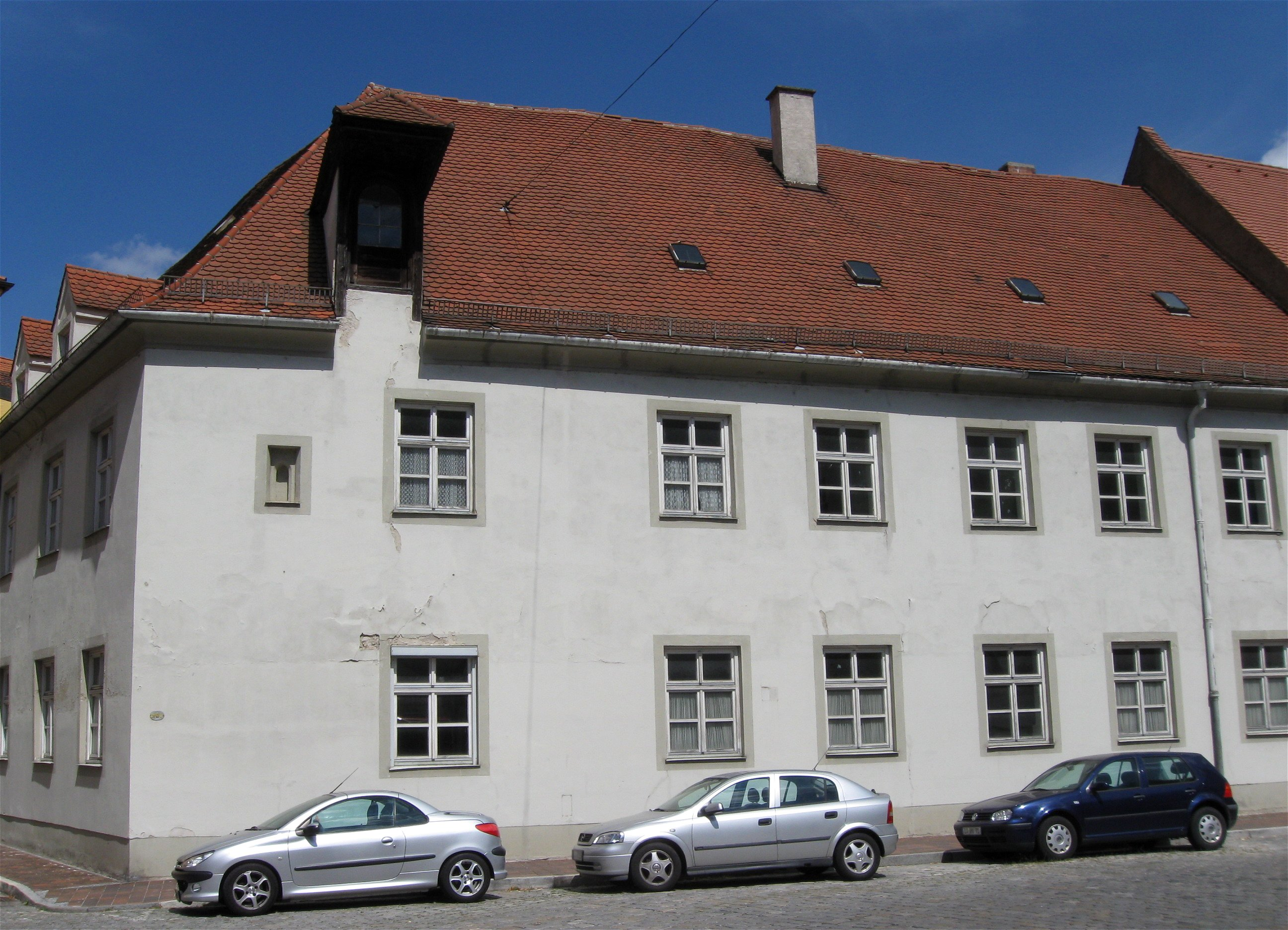 Spiegelgasse 207; ehem. Kapitelhaus des Kollegiatstiftes St. Martin und St. Kastulus, 1804-1914 Fronfeste, zweigeschossiger Eckbau mit Satteldach und Aufzugsgaube, im Kern 1338 (dendro. dat.), im 17. Jahrhundert aus zwei mittelalterlichen Bauten zusammengewachsen, Dachtragwerk 1738 (dendro. dat.)